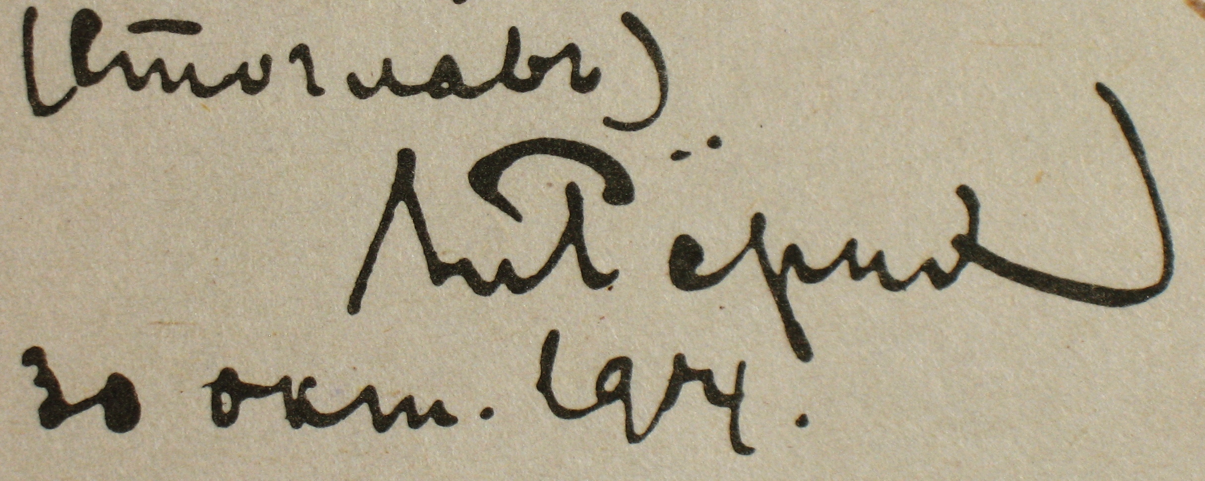 Nikolai Rerich signature (1904 или 1914).